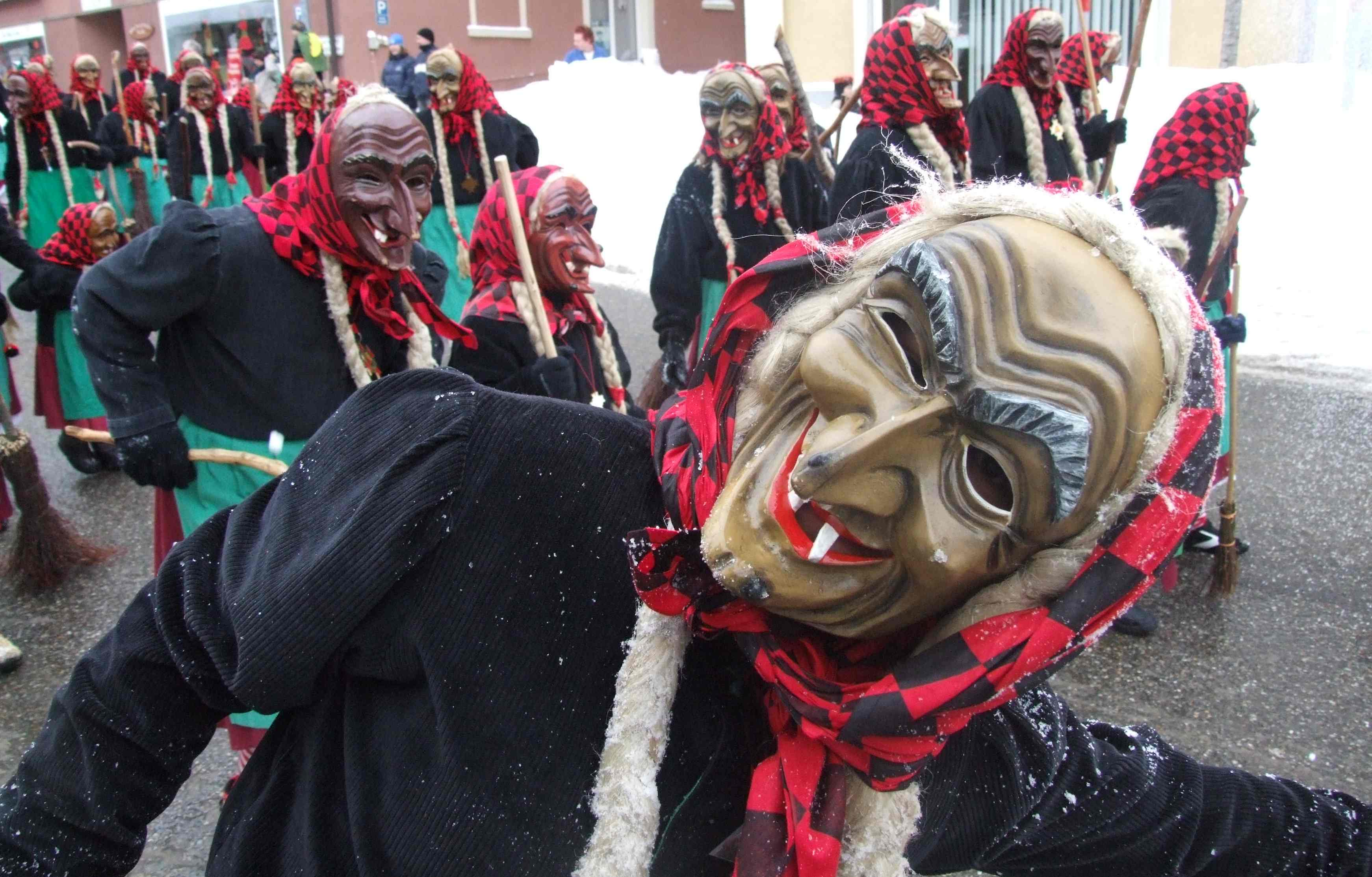 Hexen der Narrenzunft Furtwangen, 2006